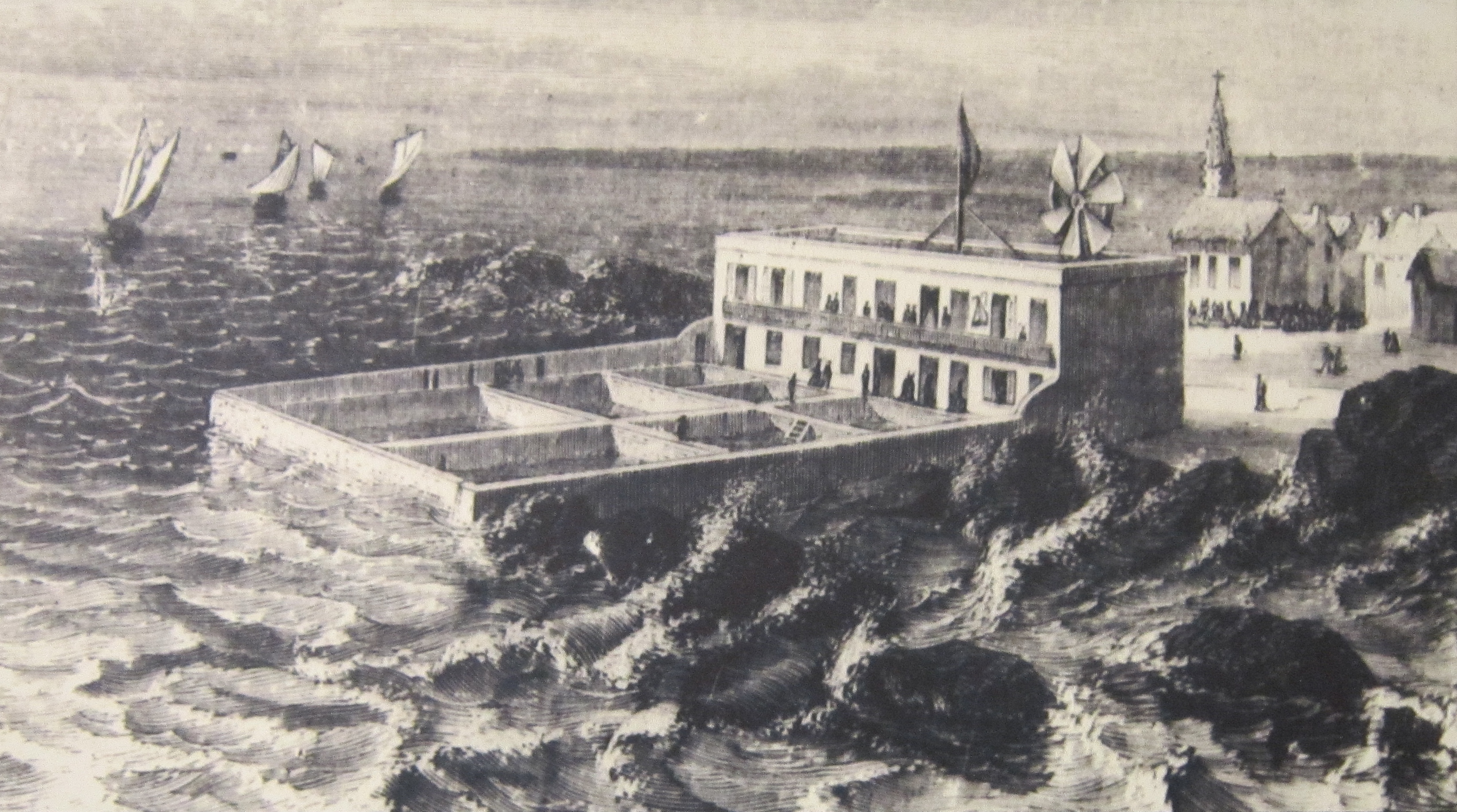 Gravure anonyme représentant le laboratoire de biologie marine de Concarneau en 1859.